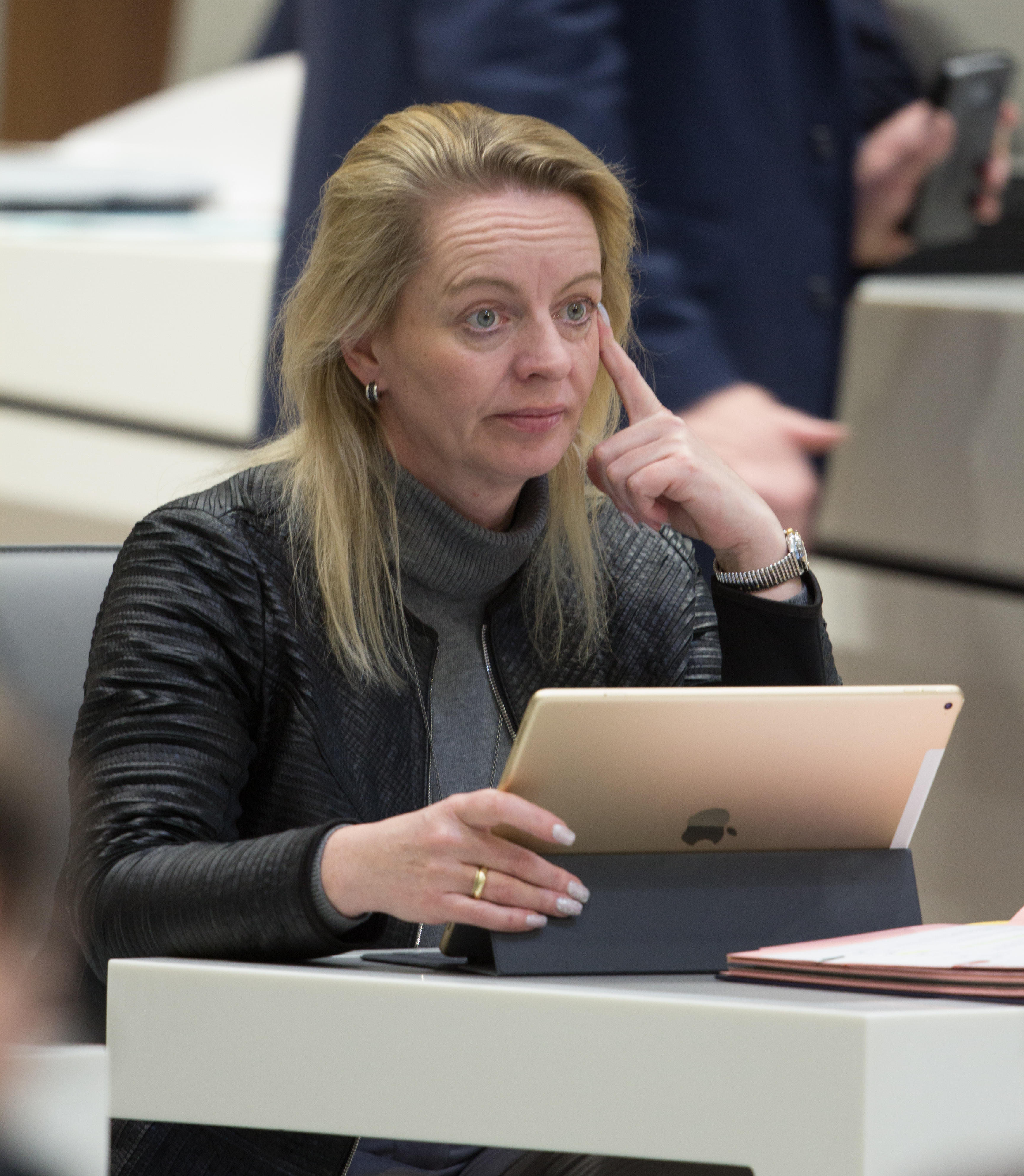 Dana Guth am 28. Februar 2018 im Plenum des Niedersächsischen Landtages.